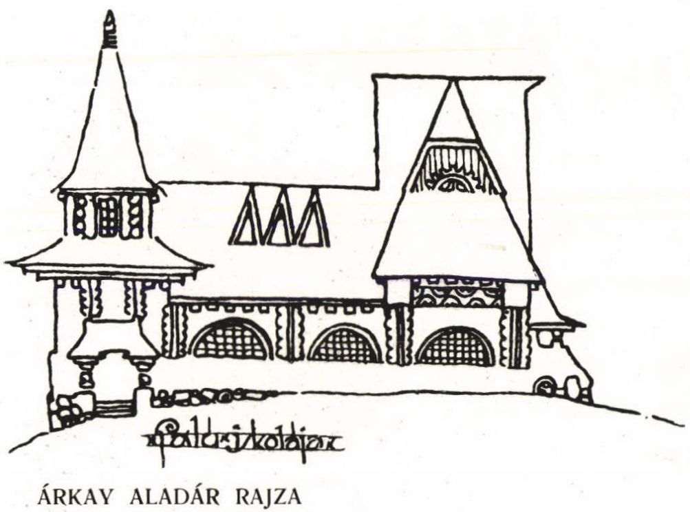 Árkay Aladár épületterve egy családi házról